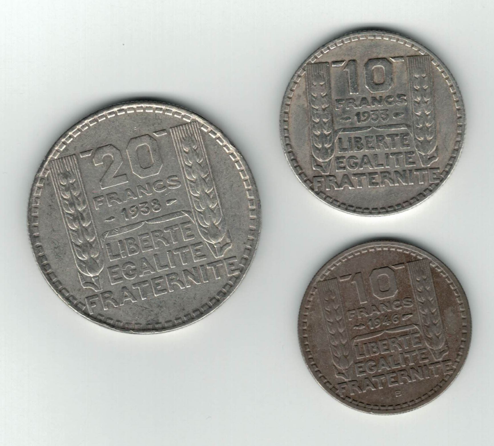 Type Turin de 10 (1933 et 1946) et 20 (1938) francs - La distinction des pièces en Argent de celles en Cupronickel se fait en fonction de l'année et de la taille de la pièce.